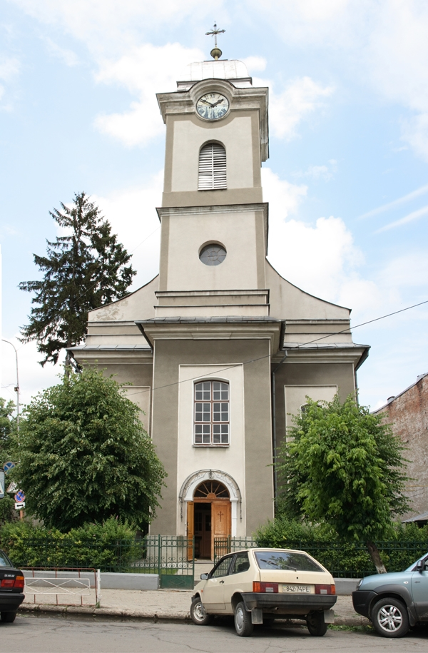 Католический костел в Хусте